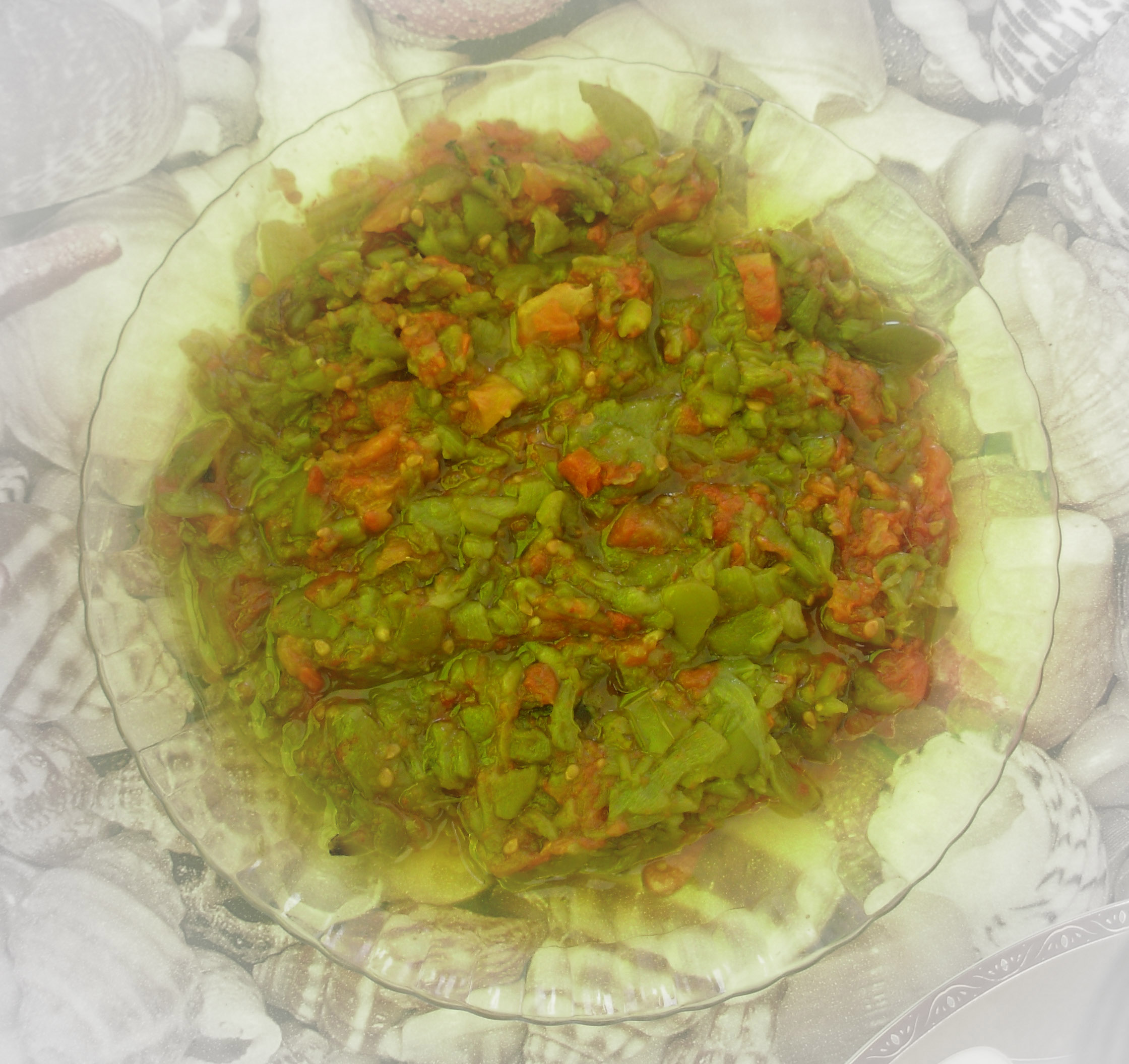 Un plat de hmiss, fait de poivrons et de tomates, assaisonnés d'huile d'olive.